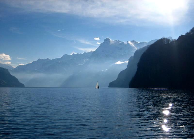 Lake Lucerne, Switzerland